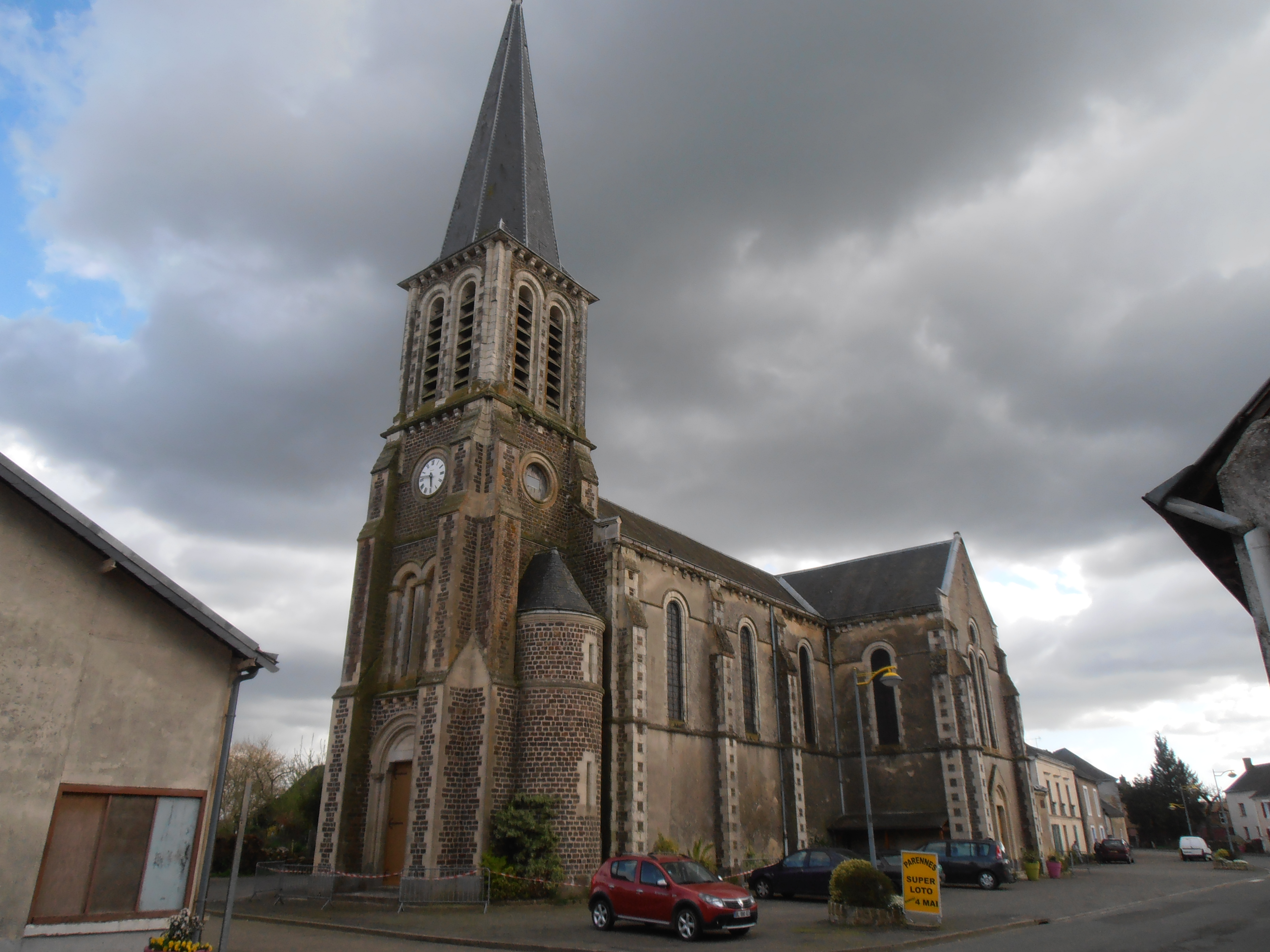 L'église de Parennes (vue générale)